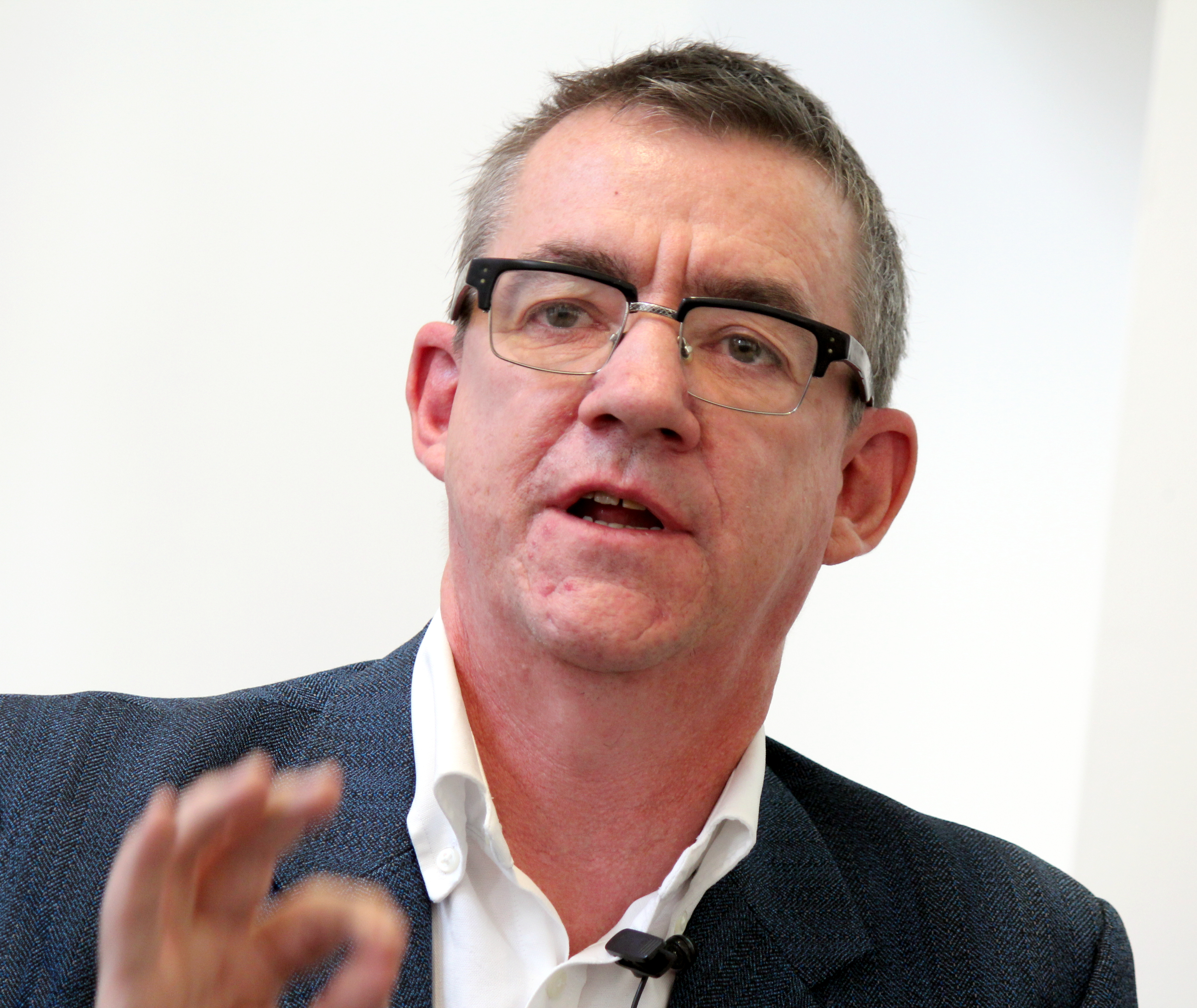 John McTernan